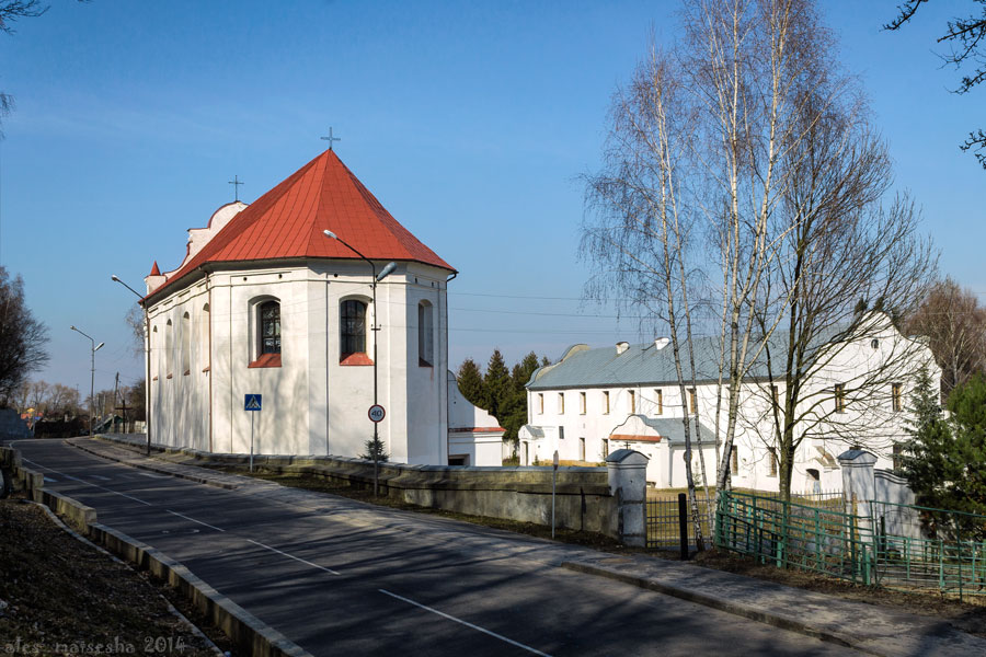 Мазыр. Касцёл Святога Міхала Арханёла і кляштар цыстэрцыянак